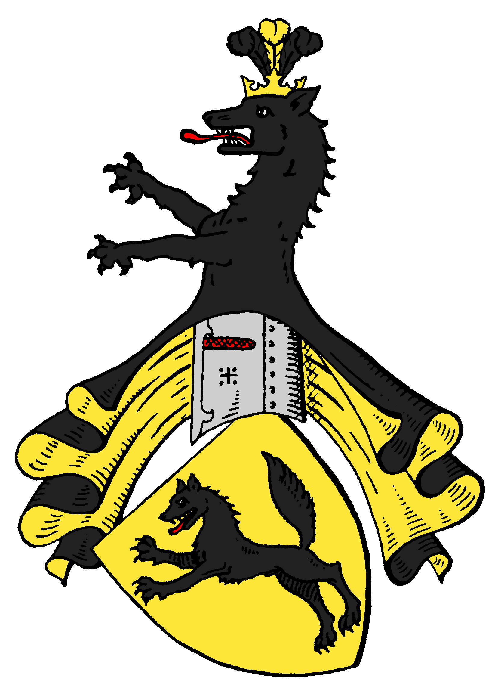 Stammwappen der von Wolffersdorff